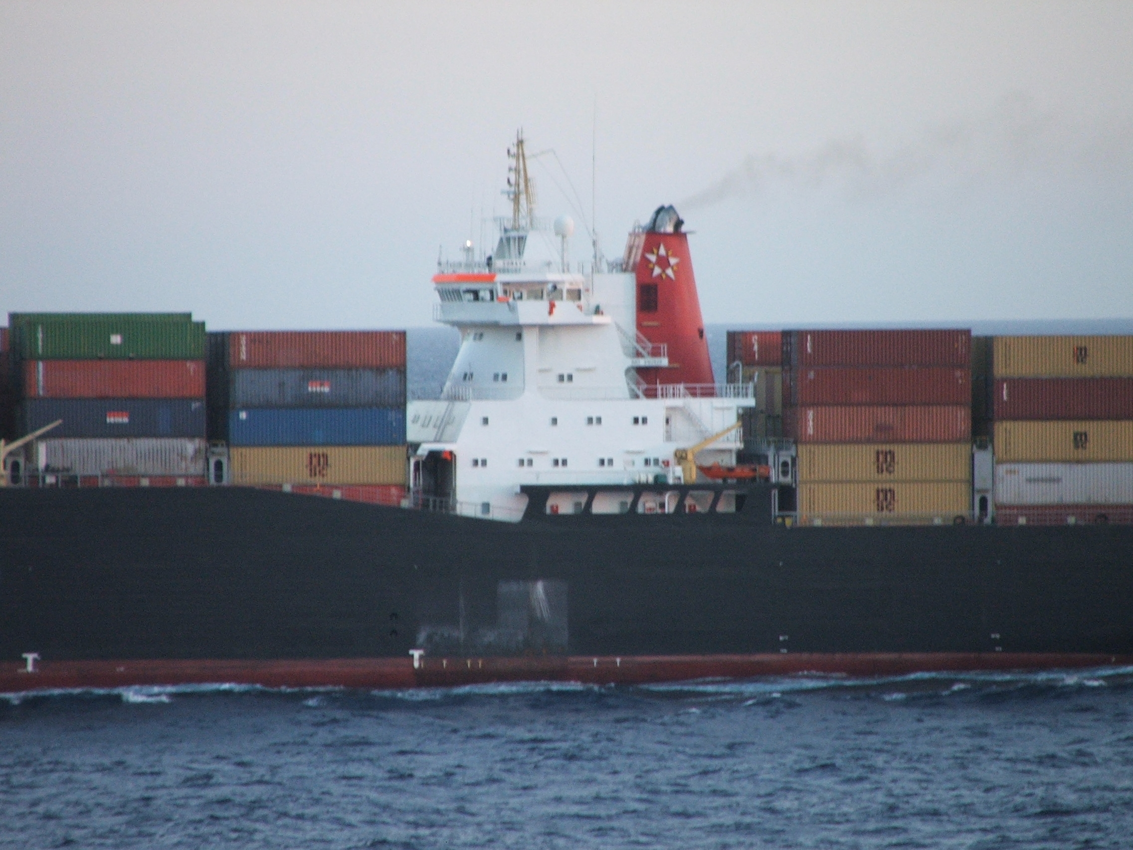 Aufbau eines HDW - Jiangnan Shipyard FFB - Schiffs IMO Number: 9162629 MMSI Number: 242589000 Callsign: CNA4099 Length: 217 m Beam: 26 m